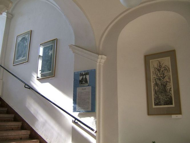 Premontrei Prépostság, Csorna. A Prépostlépcső Hertay Mária grafikusművész rézkarcaival (Csornai Múzeum).Hertay Mária állandó kiállítása a Csornai Múzeumban. A művésznő rézkarcait a Csornai Premontrei Prépostság épületében található Csornai Múzeumban a prépostlépcső falain tekinthetjük meg. A főként bibliai témájú litográfiáknak és tűzzománc képeknek pedig az egykori préposti kápolna ad helyet.